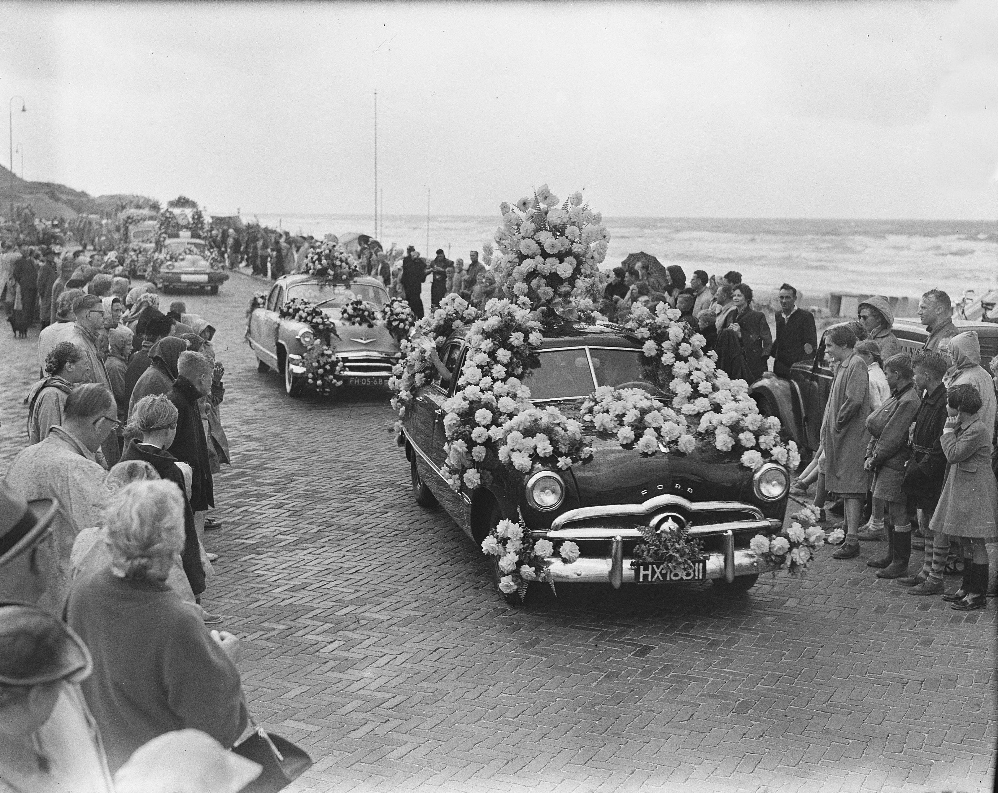 Collectie / Archief : Fotocollectie Anefo Reportage / Serie : [ onbekend ] Beschrijving : Bloemencorso Noordwijk en Rijnsburg Datum : 25 augustus 1953 Locatie : Noordwijk, Rijnsburg Trefwoorden : BLOEMENCORSO Persoonsnaam : Bloemencorso Fotograaf : Duinen, […] van / Anefo Auteursrechthebbende : Nationaal Archief Materiaalsoort : Glasnegatief Nummer archiefinventaris : bekijk toegang 2.24.01.09 Bestanddeelnummer : 905-9080